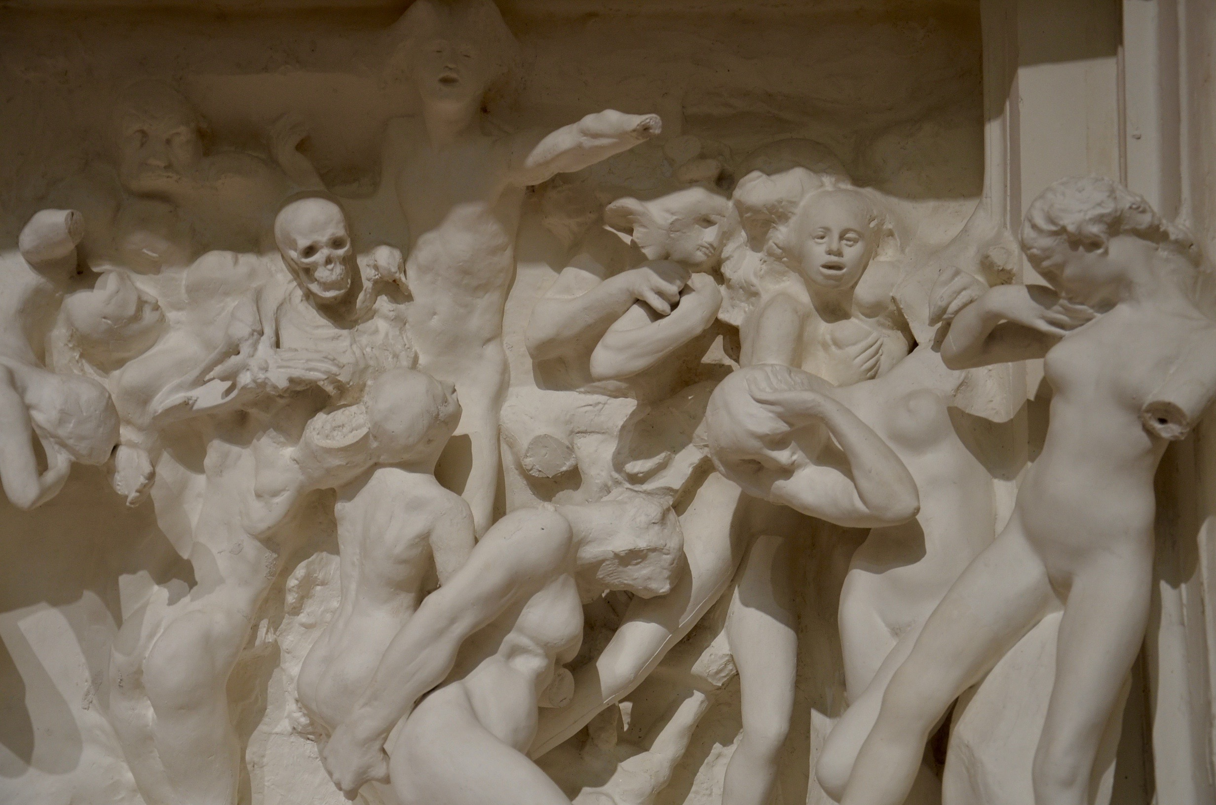 Tímpano de la Puerta del Infierno de Auguste Rodin Acervo Museo Soumaya, Fundación Carlos Slim. CDMX , México